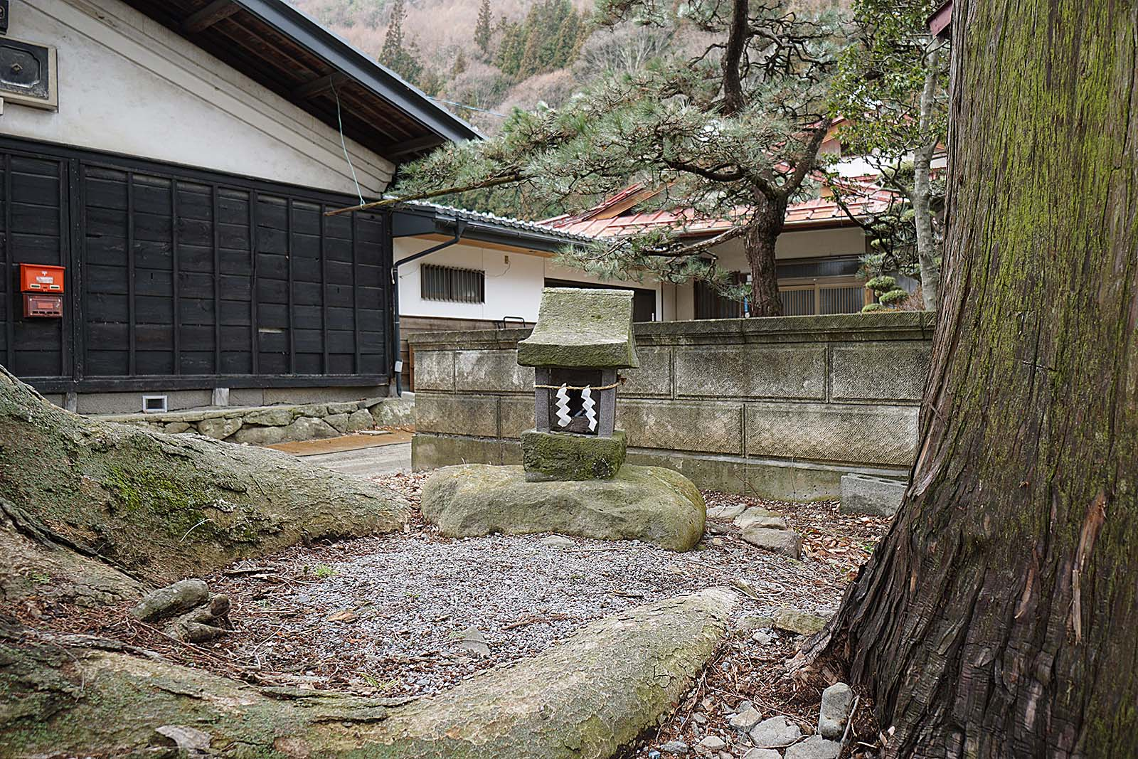 Suwa taisha Kamisha Maemiya , 諏訪大社 上社 前宮 御室社